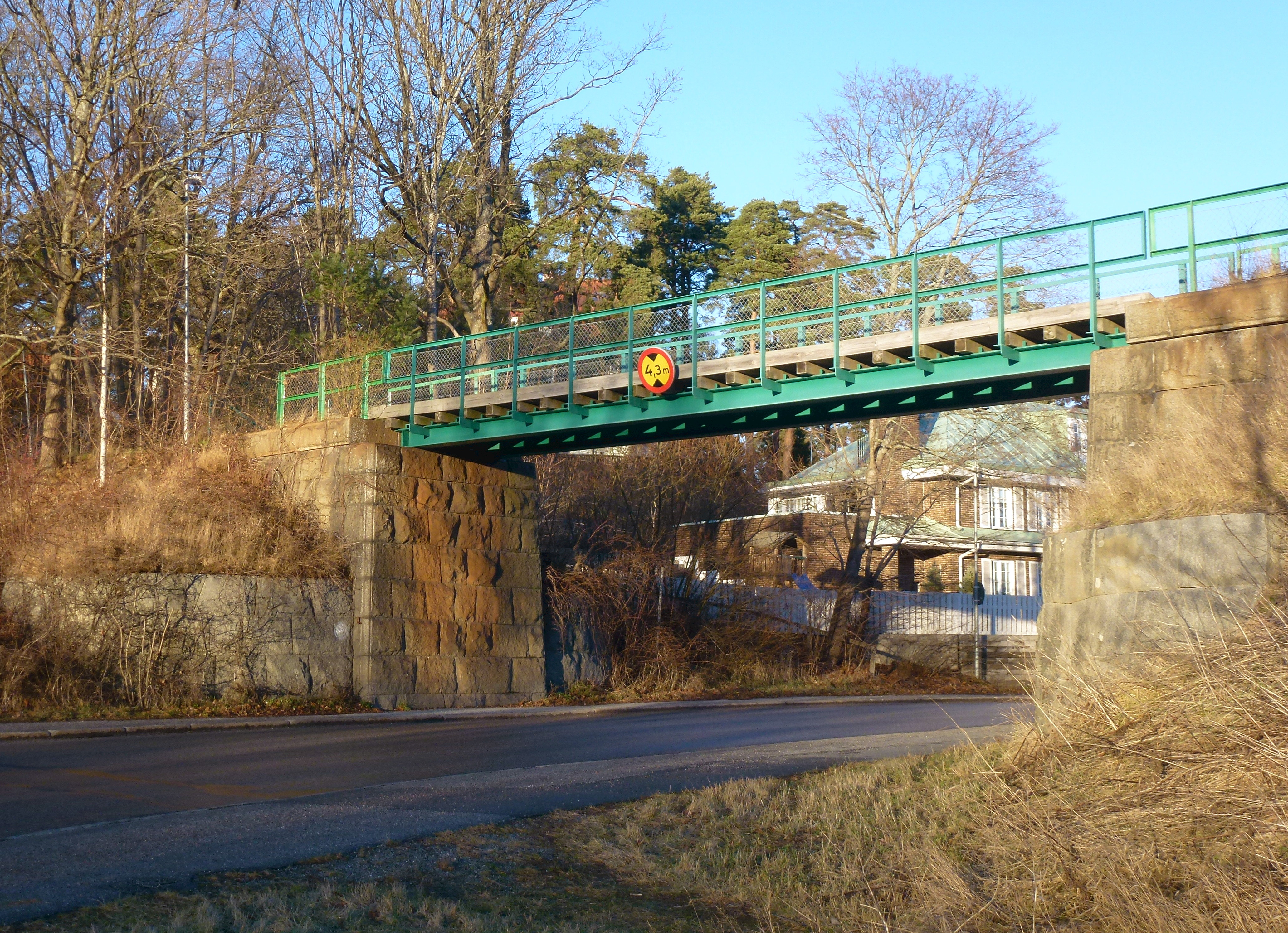 Djursholmsbanans gamla viadukt över Norrängsvägen